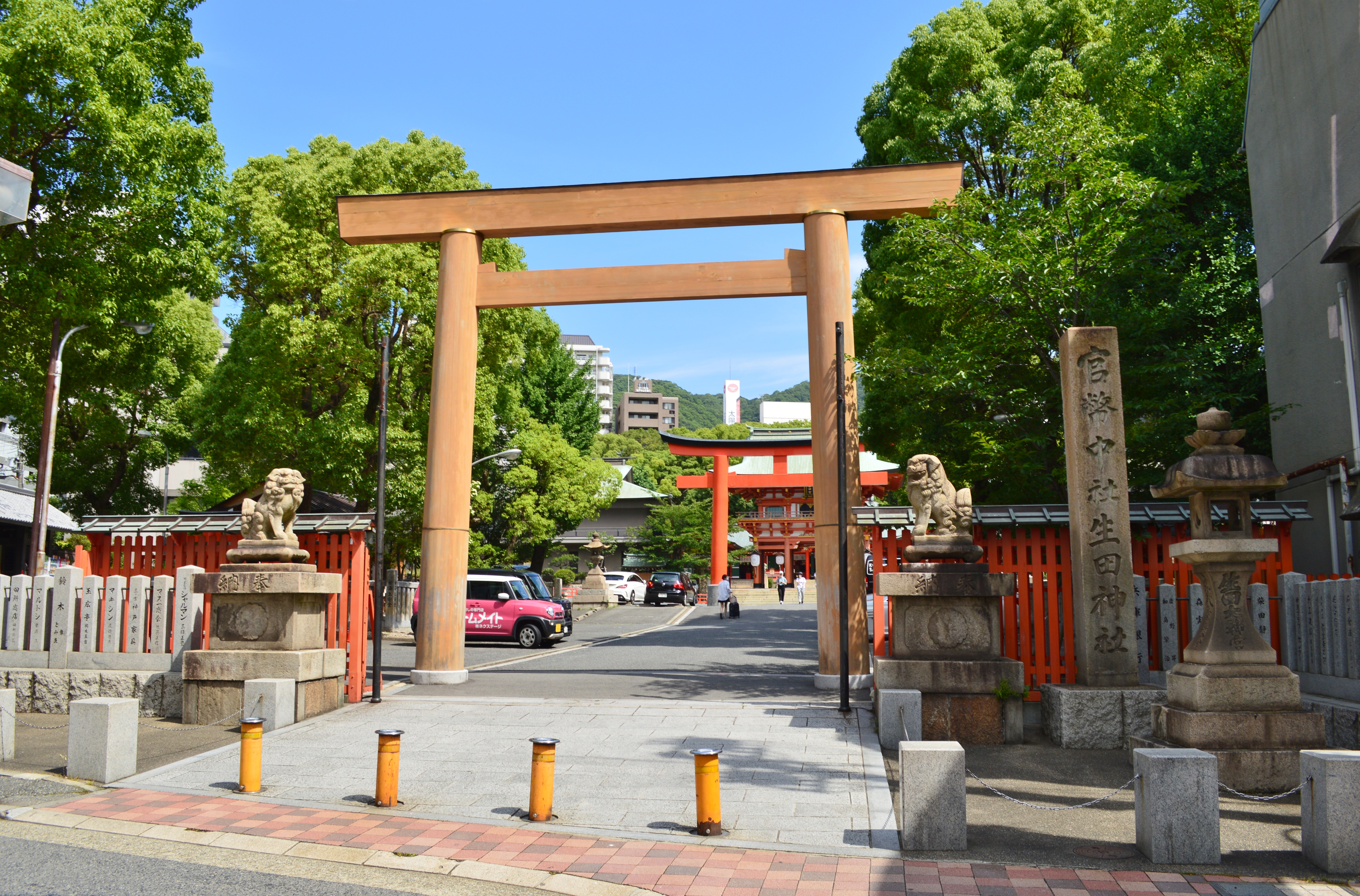 生田神社 大鳥居 Nikon D3200